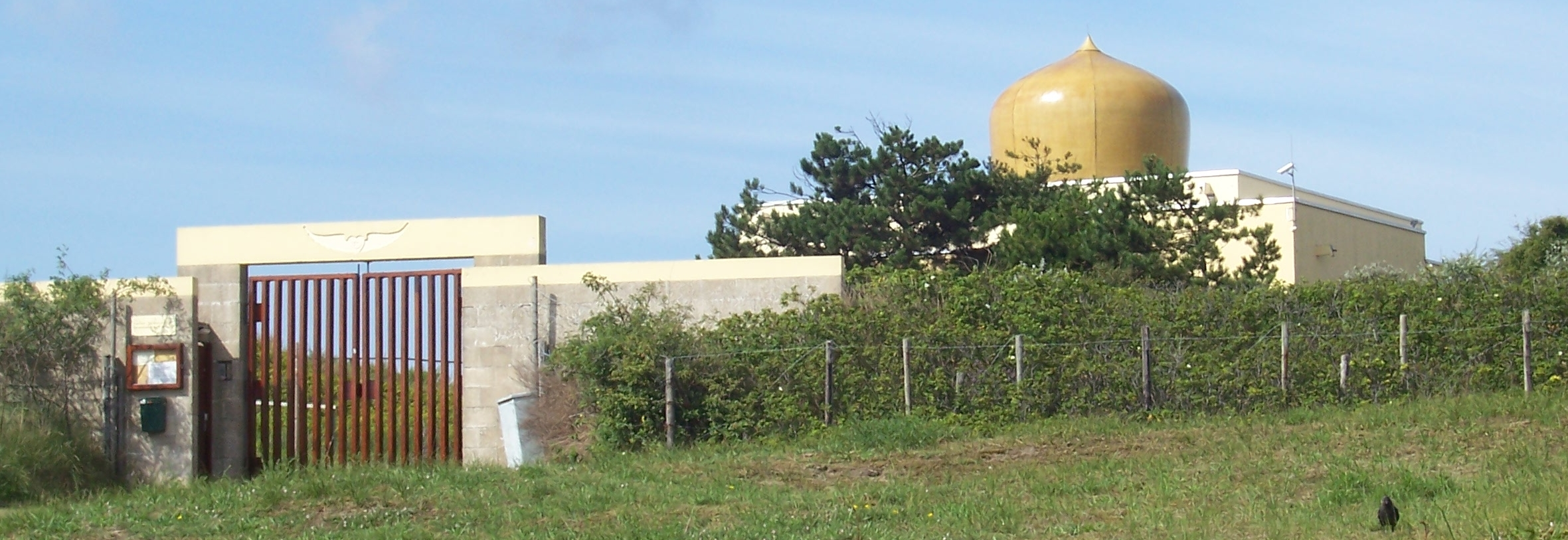 Universel Murad Hassil, Soefitempel, Katwijk aan Zee, Zuidduinen